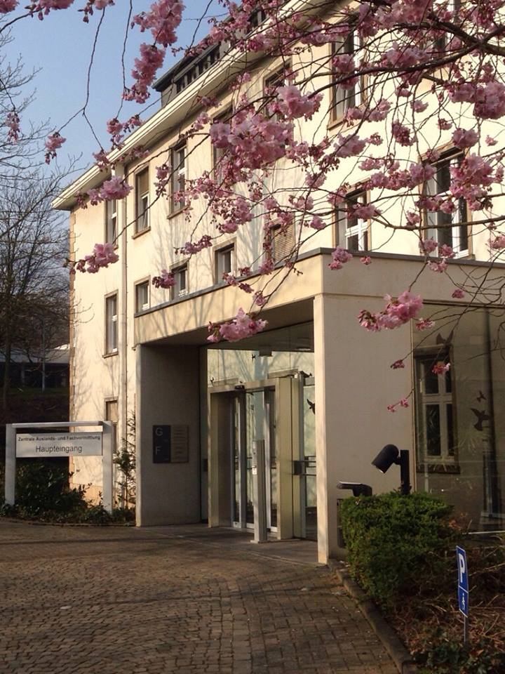 Zentrale Auslands- und Fachvermittlung (ZAV) in Bonn, Haupteingang. Gebäude der ehemaligen Bonner Gallwitz-Kaserne. Villemombler Str. 76, 53123 Bonn.